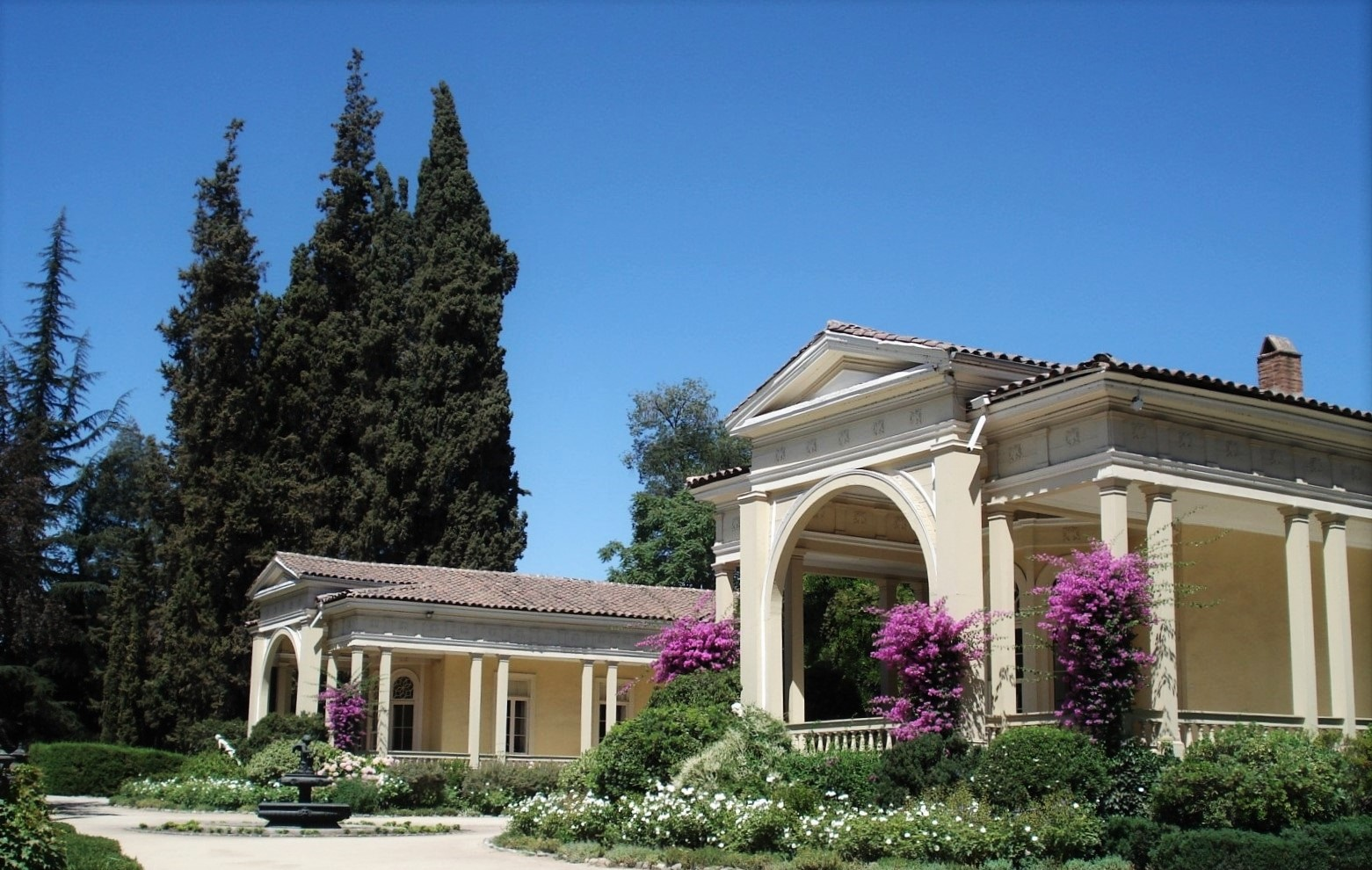 Casona de Pirque, Viña Concha y Toro